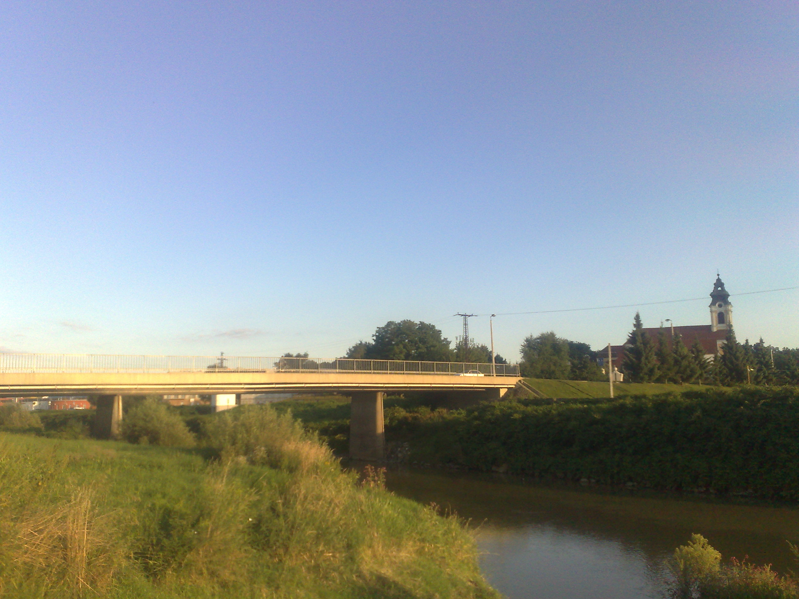 A szentgotthárdi Rába-híd - a háttérben a város római katolikus temploma